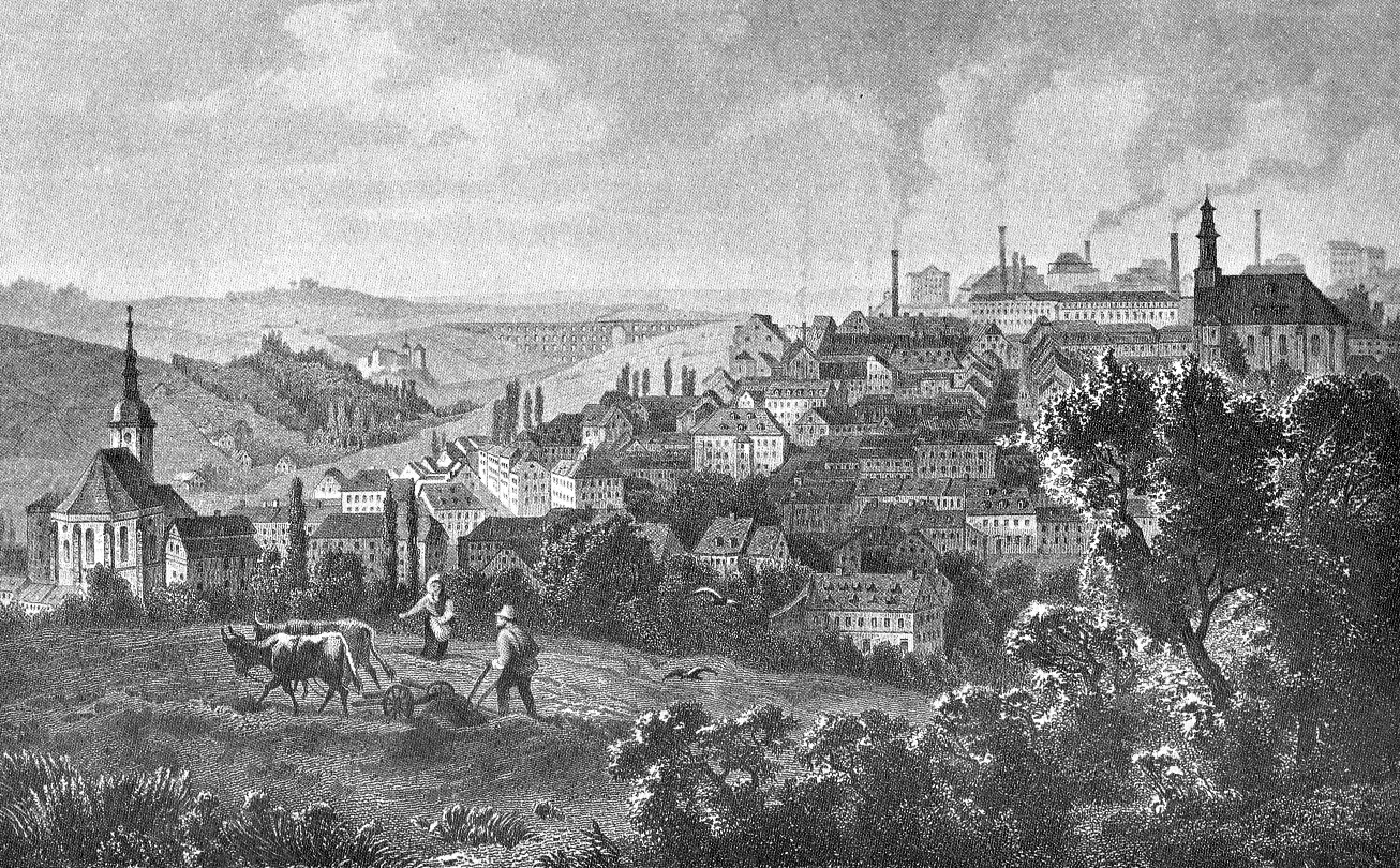 Historische Ansicht von Reichenbach im Vogtland, Sachsen. Stahlstich.